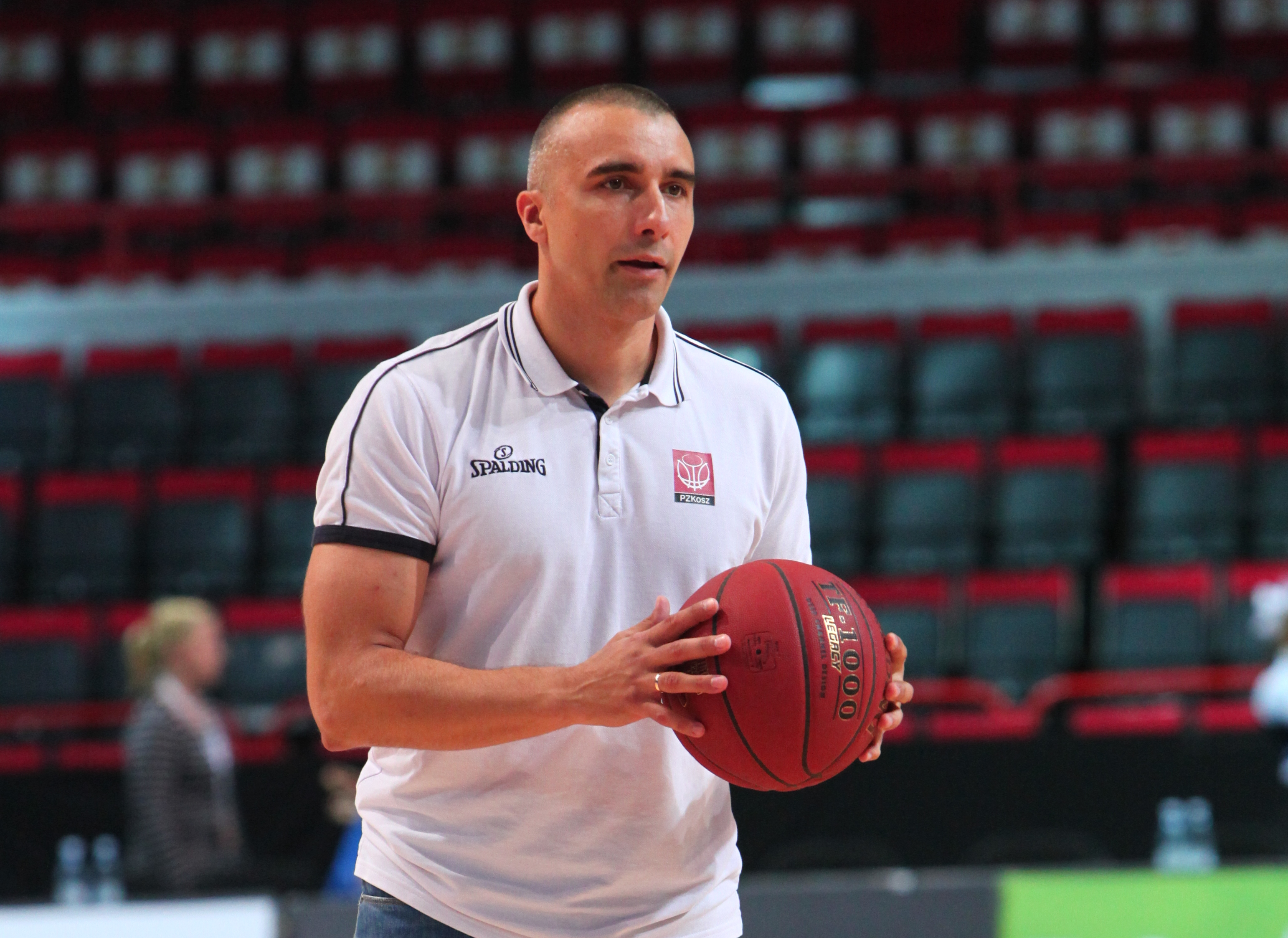 Andrzej Pluta w roli asystenta selekcjonera reprezentacji Polski w koszykówce mężczyzn.